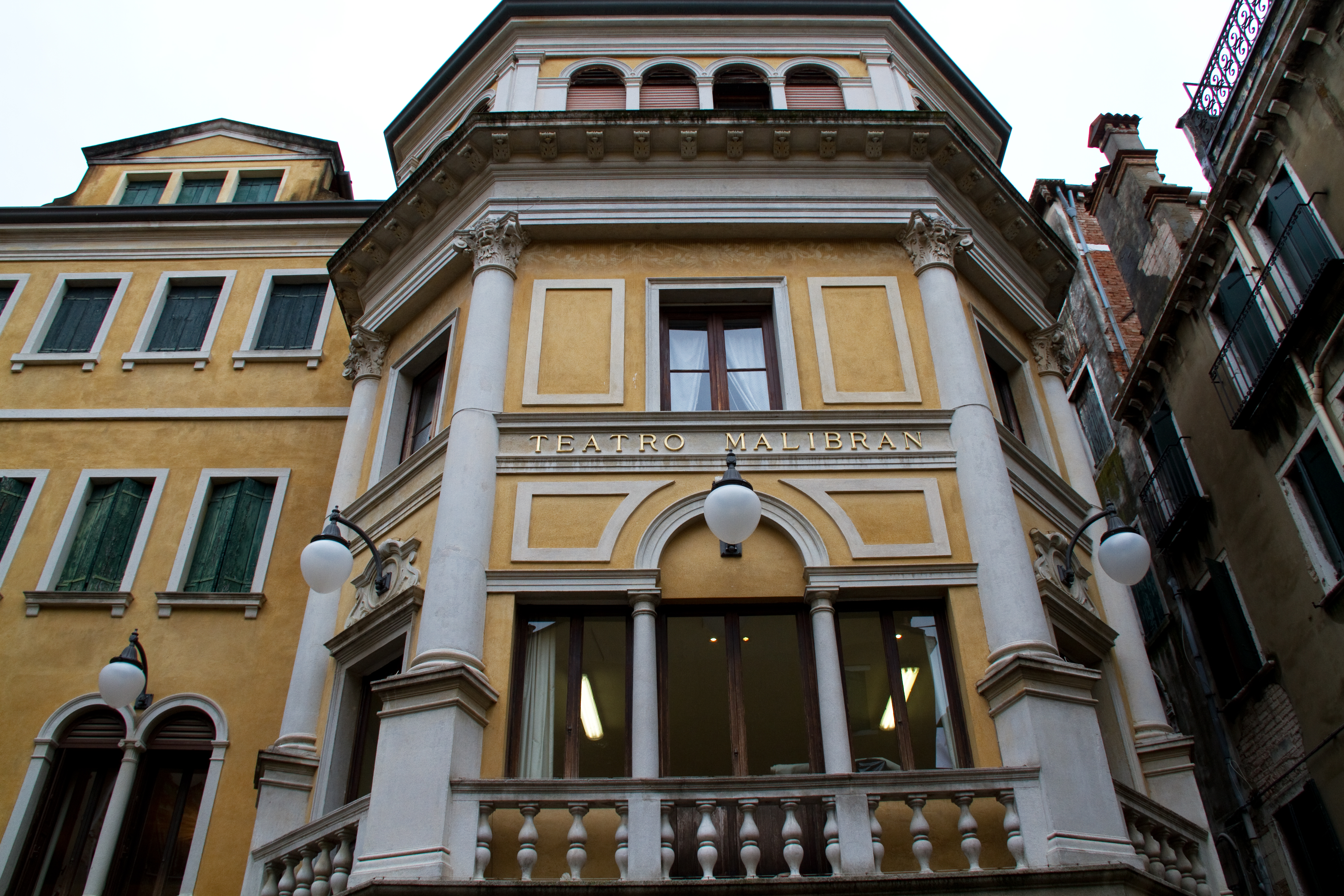 Teatro Malibran